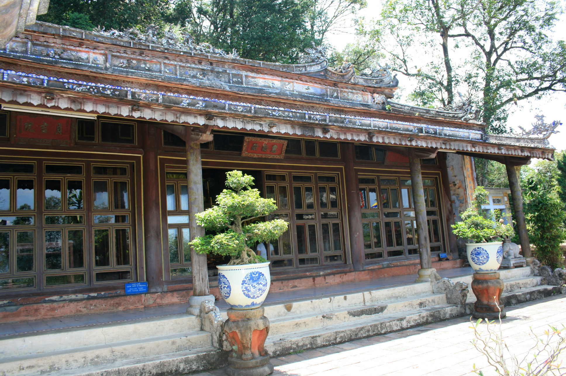 Chính điện Hòn Chén